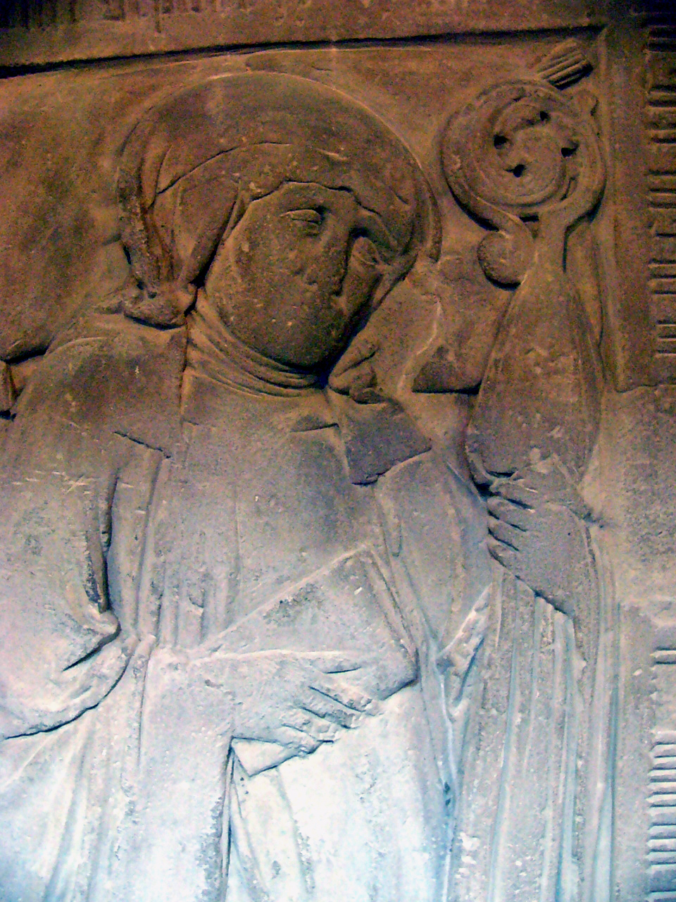 Epitaph der Äbtissin Magdalena von Wirsberg in der Kirche des Klosters Himmelkron